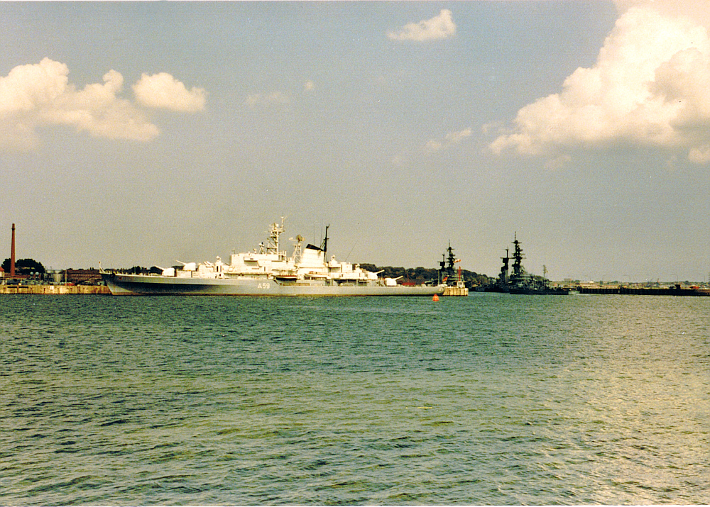 Schulschiff Deutschland Aufnahmeort: Kiel